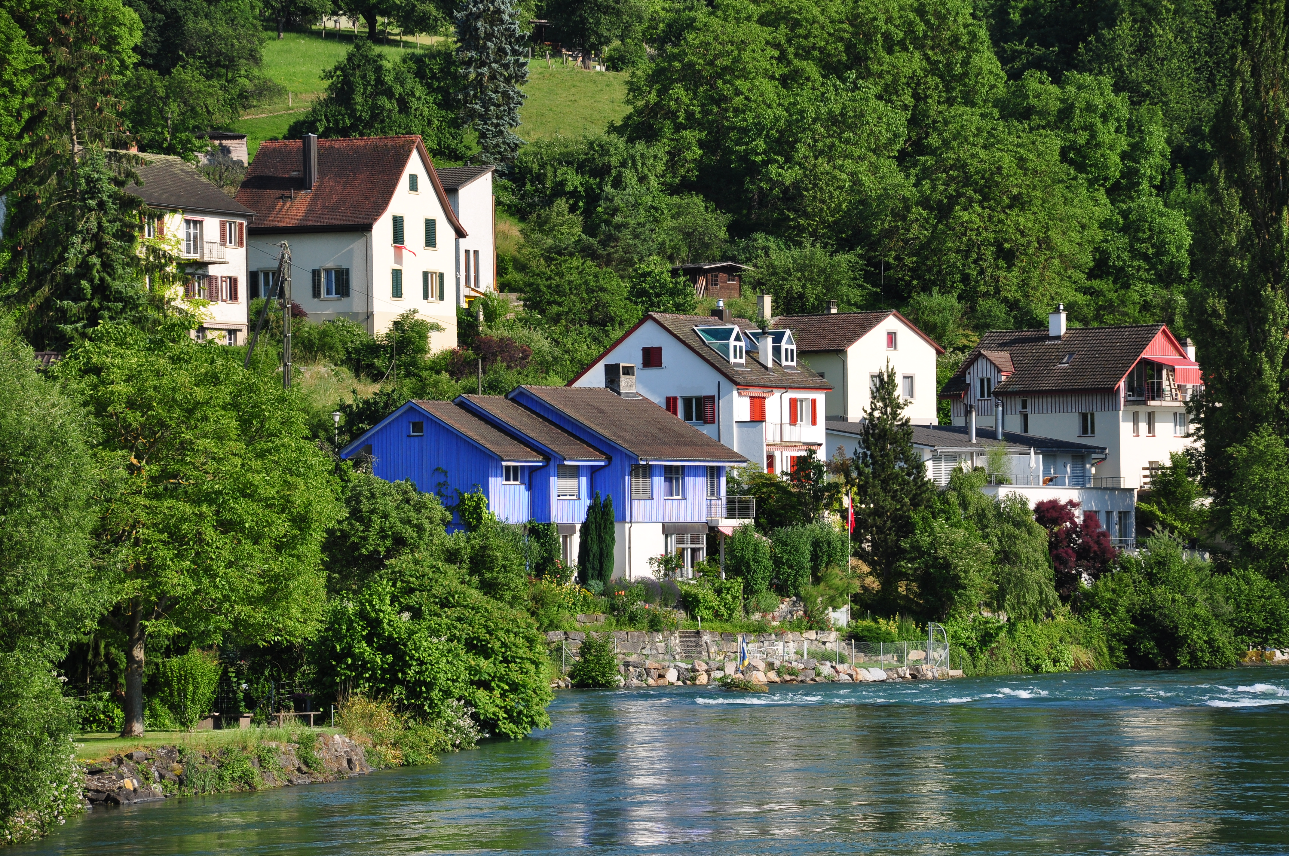 Flurlingen (Switzerland)